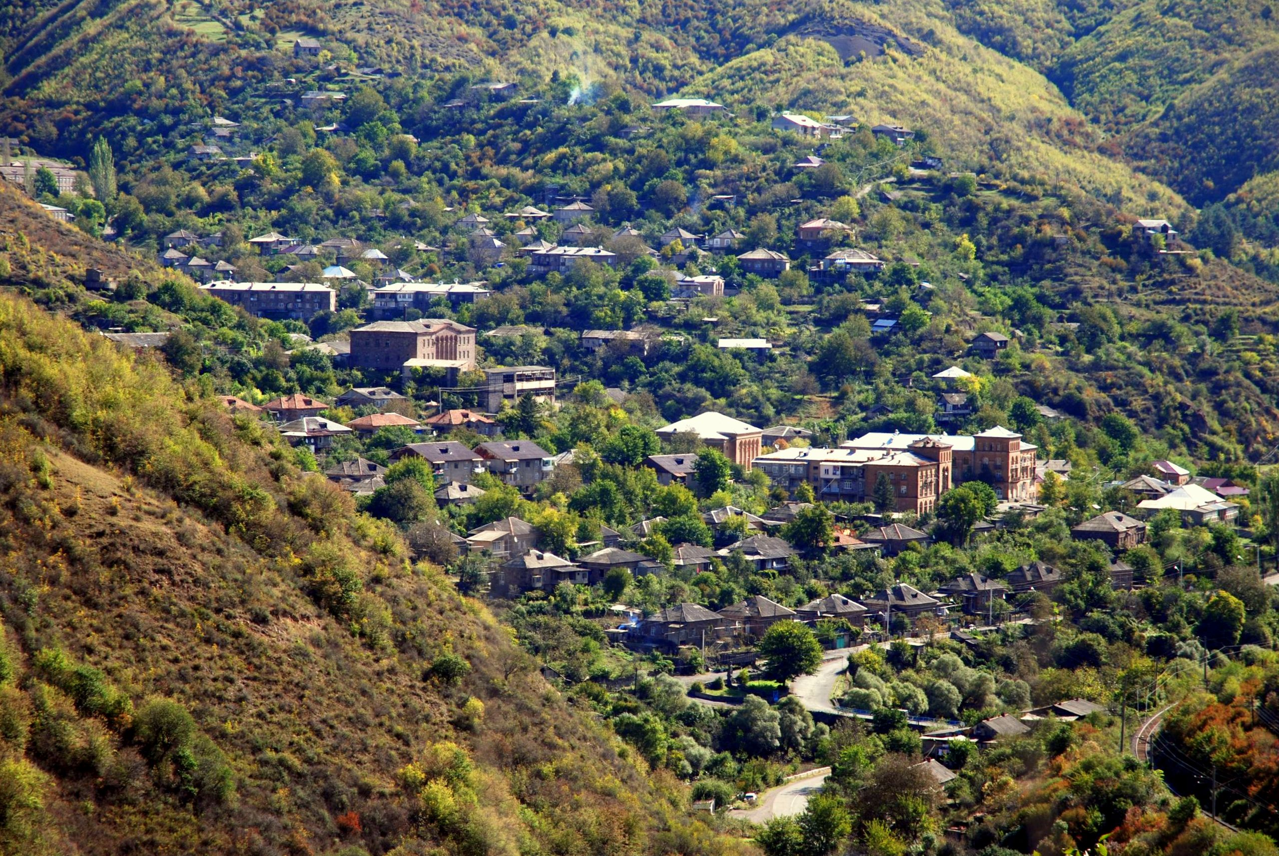 Tumanyan from Kobayr